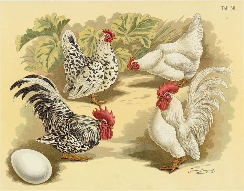 Japanisches Bantam (Chabo). Gallus dom. nanus japanicus. Japanese Bantams. Bantam de Nagasaki.